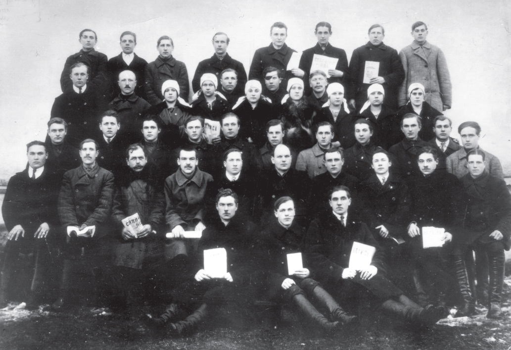 Жодзішскі гурток Беларускага інстытута гаспадаркі і культуры. У 2-м раду ў цэнтры сядзіць а. В. Гадлеўскі. 1925 год. БДАМЛіМ